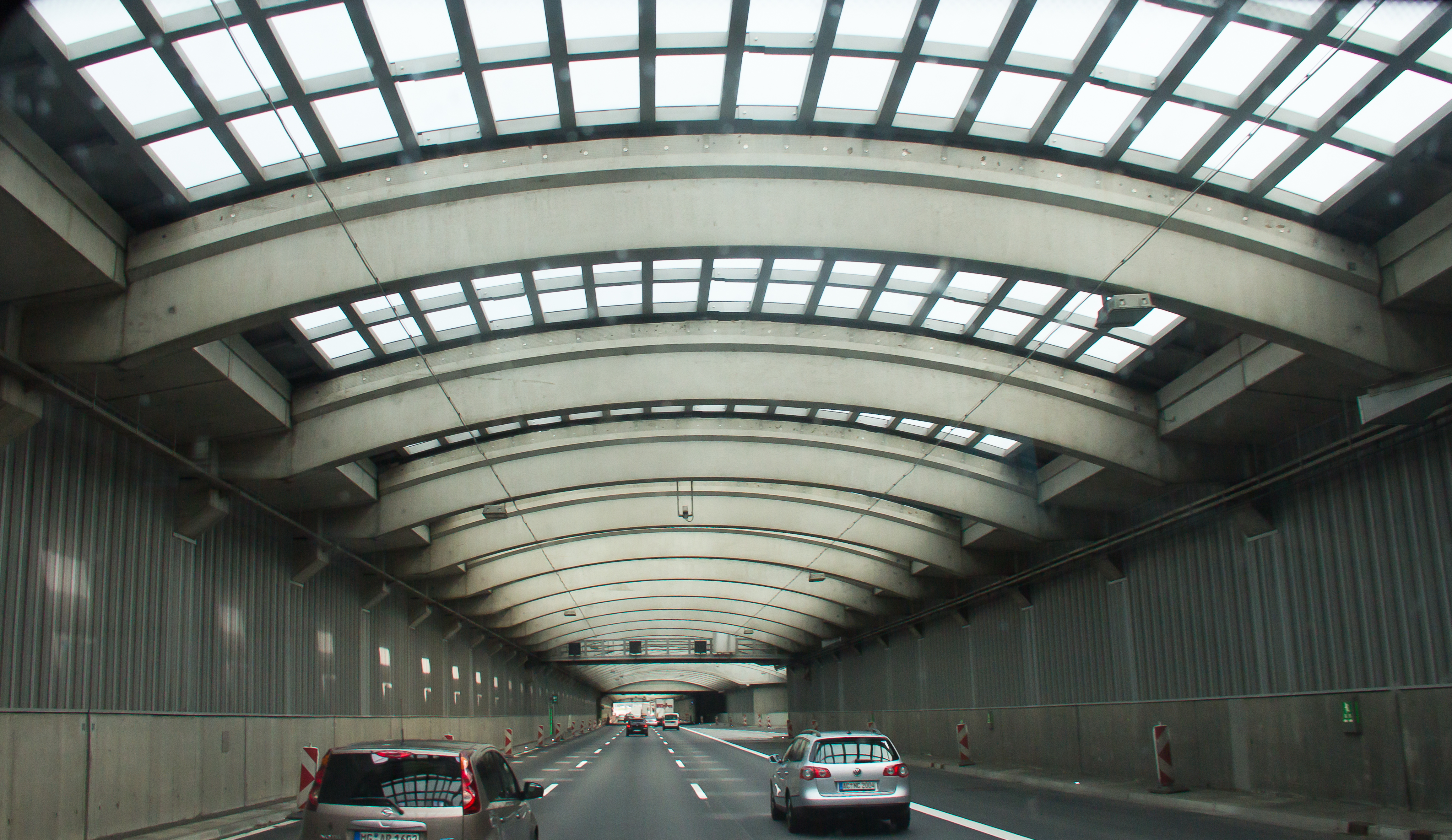 Bundesautobahn 1/A1 westlich von Köln: Einhausung Lövenich mit Glasdach. Fahrtrichtung Norden